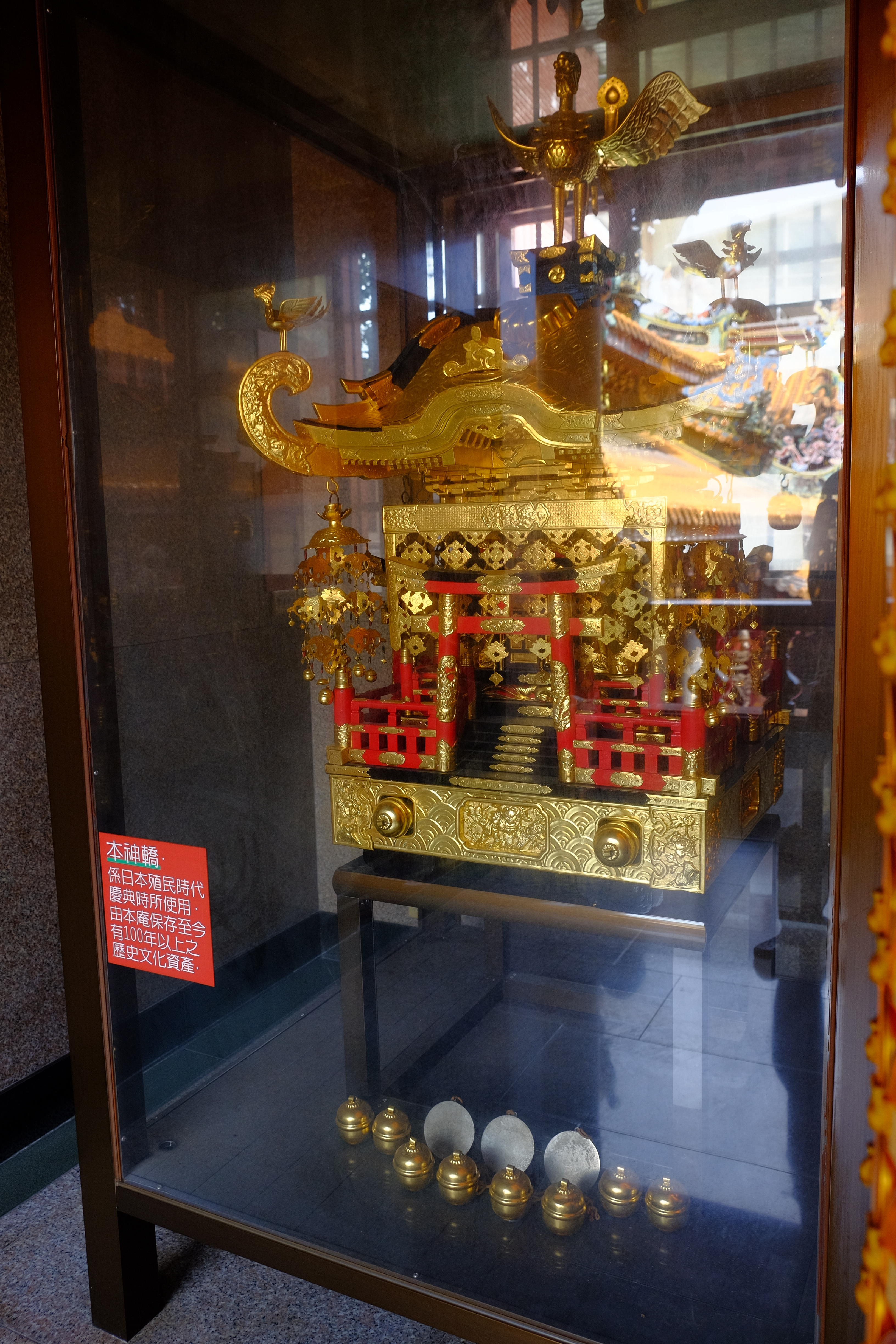 地藏庵日本神轎